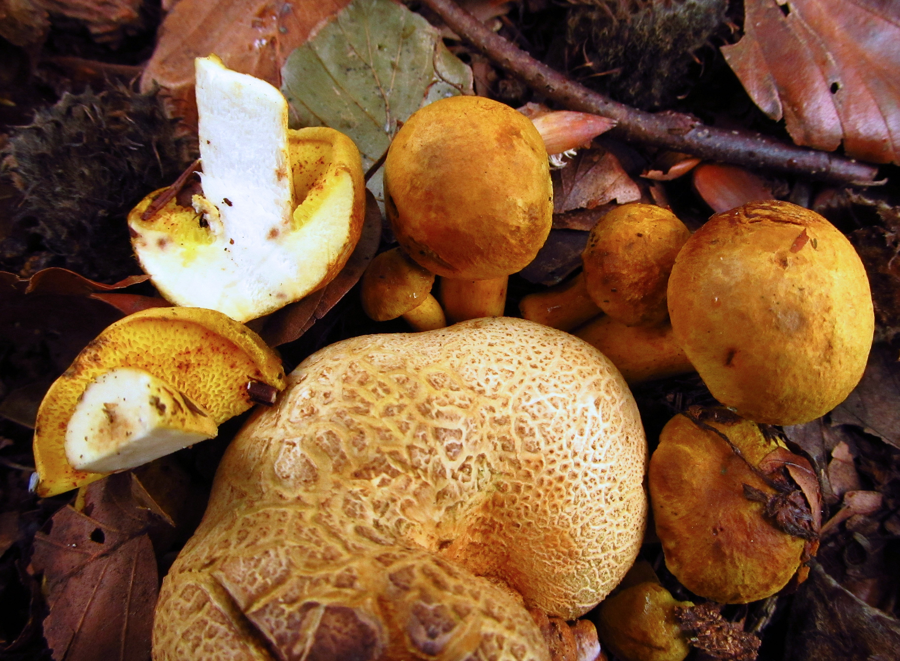 Der Parasitische Röhrling (Pseudoboletus parasiticus), auch Schmarotzer-Röhrling genannt, ist ein recht seltener Pilz, welcher als Parasit ausschließlich an Kartoffelbovisten wächst. Photo: 04.10.2011, Hochwald bei Xanten-Marienbaum/ Kreis Wesel/ Niederrhein. In den Jahren davor und seither habe ich keine neuen Exemplare gefunden.